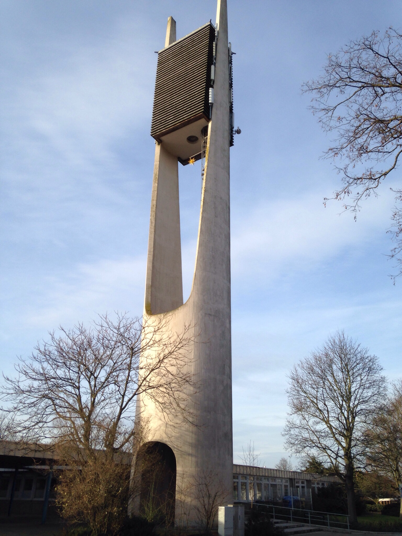 Der Glockenturm der Pauluskiche Lüneburg.